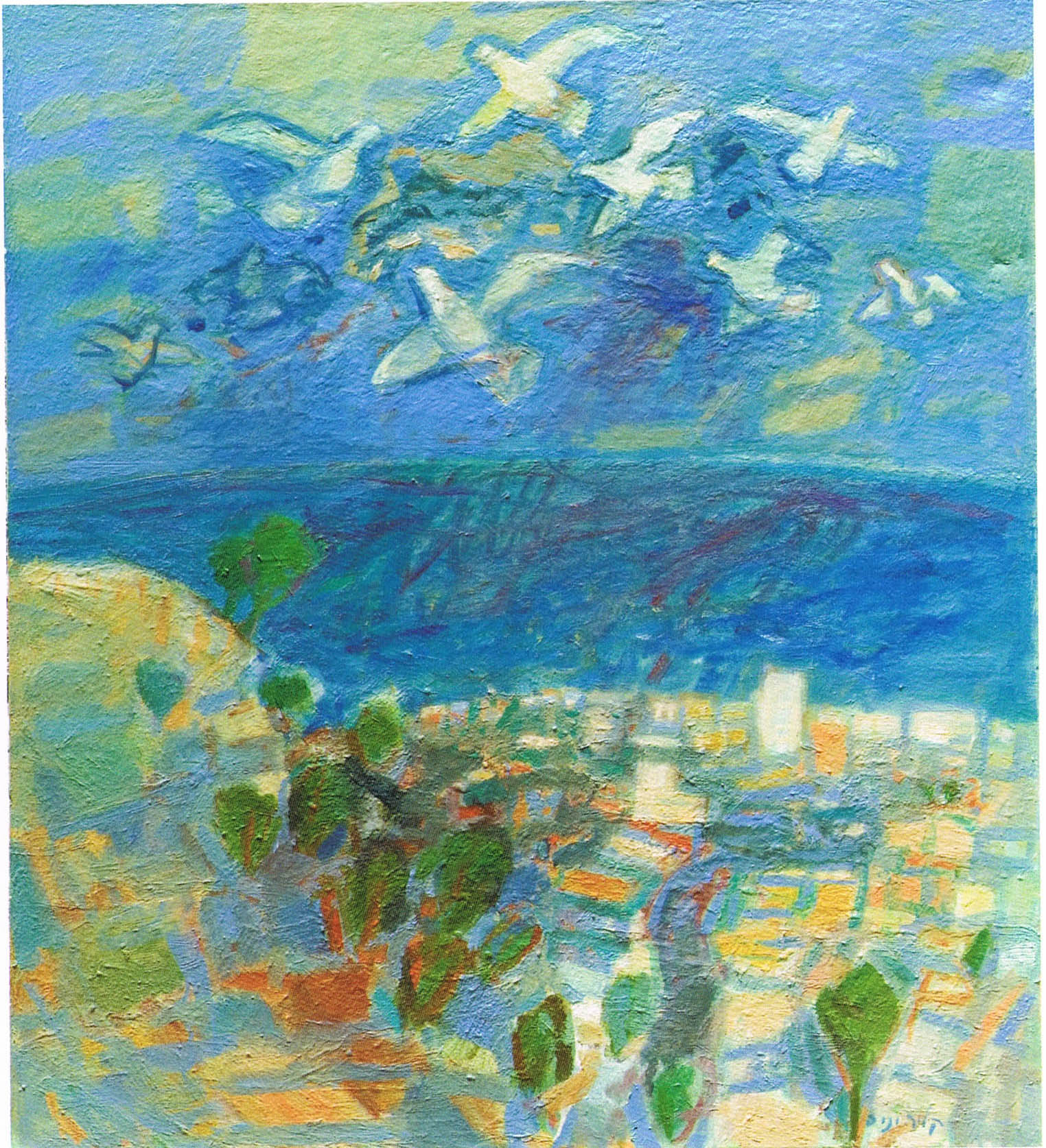 נוף חיפה מהכרמל